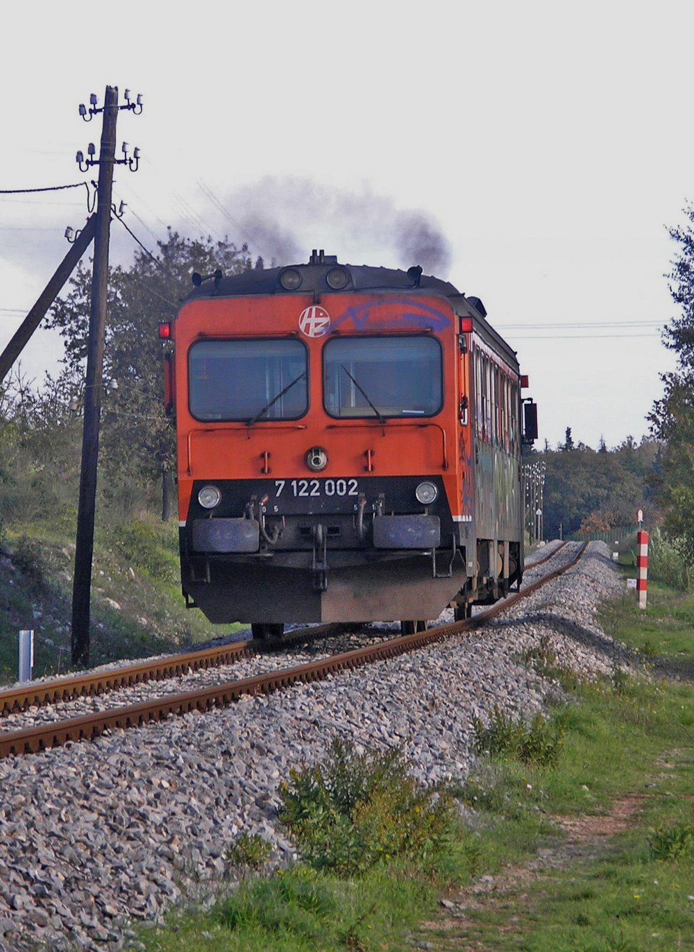 HŽ 7122 007 DMU (Kalmar Verkstad Y1) in Pula, Croatia